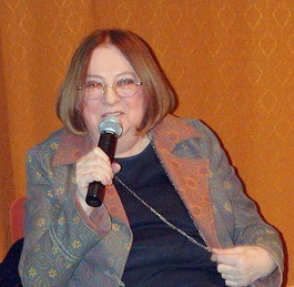 Wanda Warska, Polish jazz vocalist